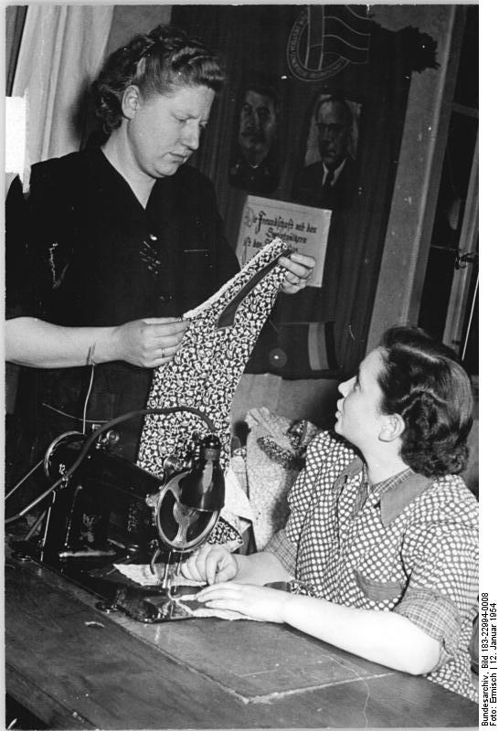 Zentralbild-Wittig-Sta-Sch.-TBD-12.1.1954-Eine Frau meistert das Leben.Luise Ermisch, Leiterin des VEB Kleiderwerk Mühlhausen. 8) Die Meisterin Liselotte Ertingshausen (links) prüft eine Schürze, die Kollegin Jutta Wolfgang, sie beherrscht sämtliche Positionen, genäht hat. (Siehe Begleittext Nr. 22994).